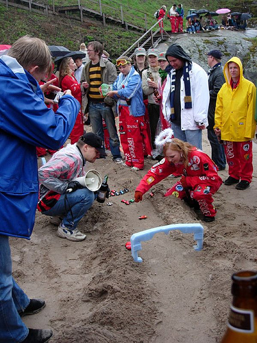 Kannunvalajien neppiksen Suomenlinna Grand Prix 2006